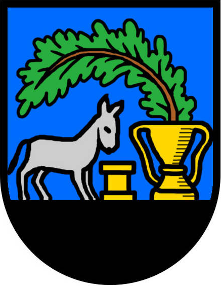 Coat of arms of the Town Bodenheim